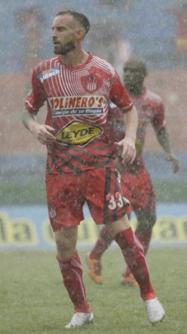 Rodriguez.